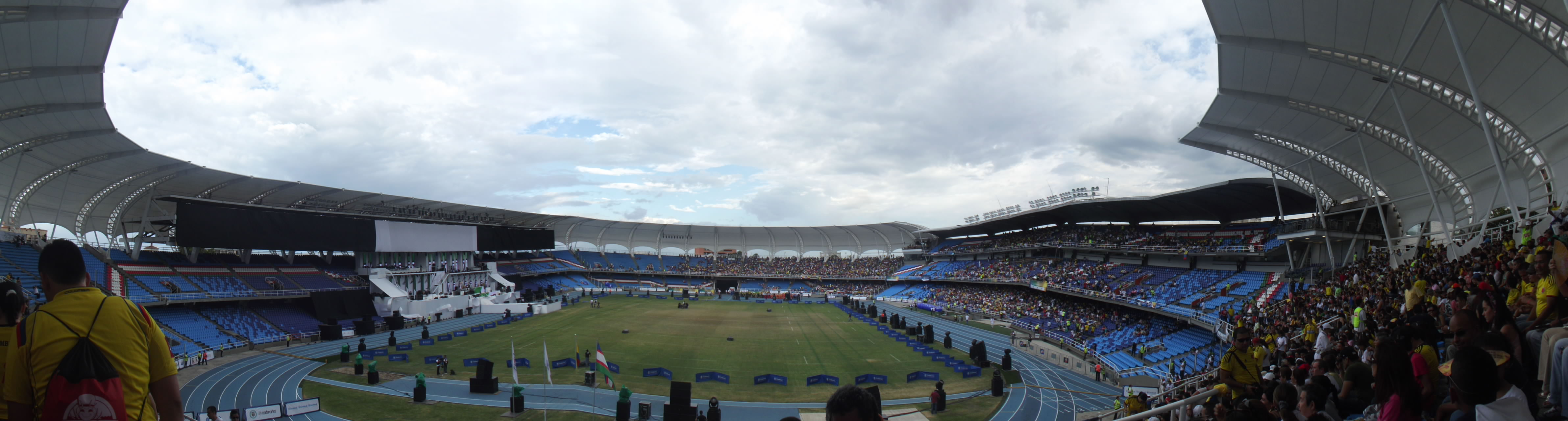 Inauxguro de la Mondaj Ludoj Kalio 2013